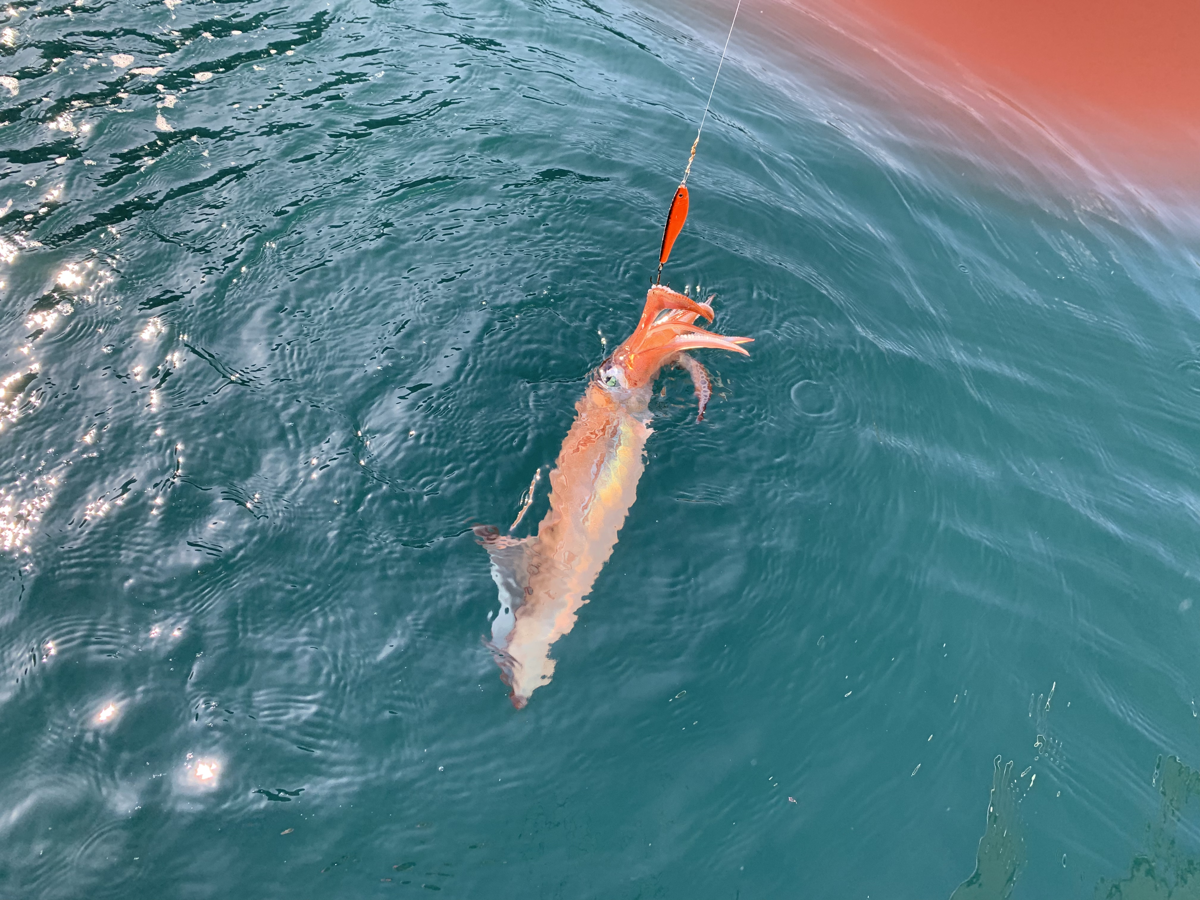 Loligo forbesi, gefangen im Geirangerfjord (im Wasser)